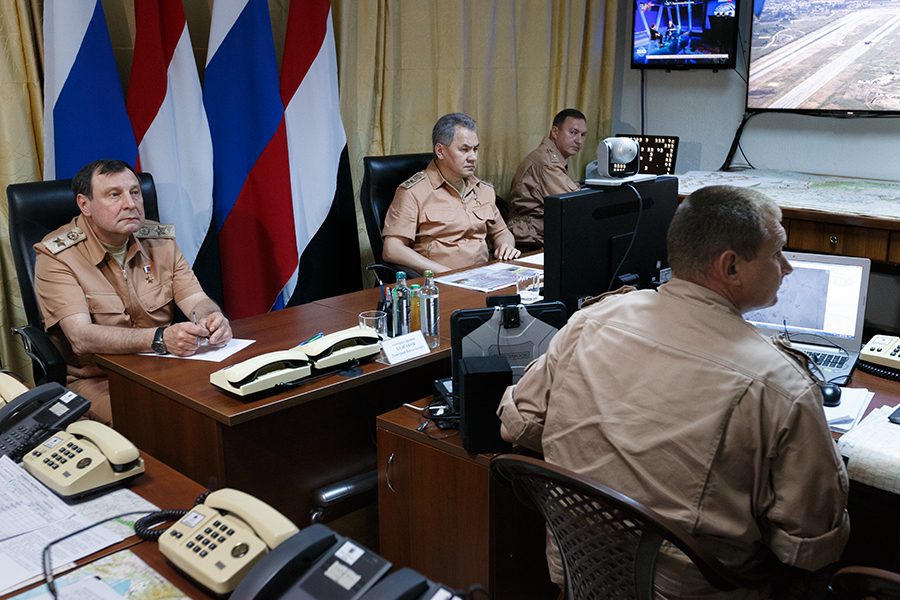 Инспектирование несения российскими военнослужащими боевой службы на авиабазе Хмеймим в Сирии Министром обороны Российской Федерации генералом армии Сергеем Шойгу